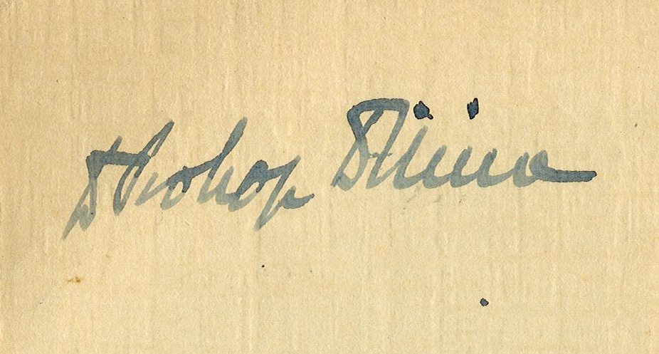 podpis z roku 1947